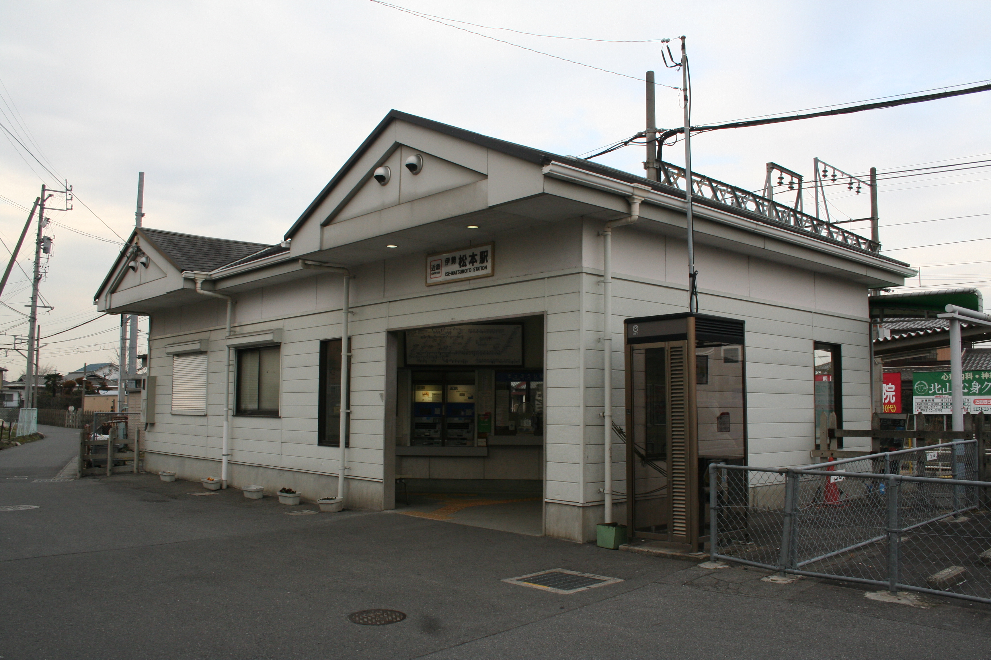 伊勢松本駅